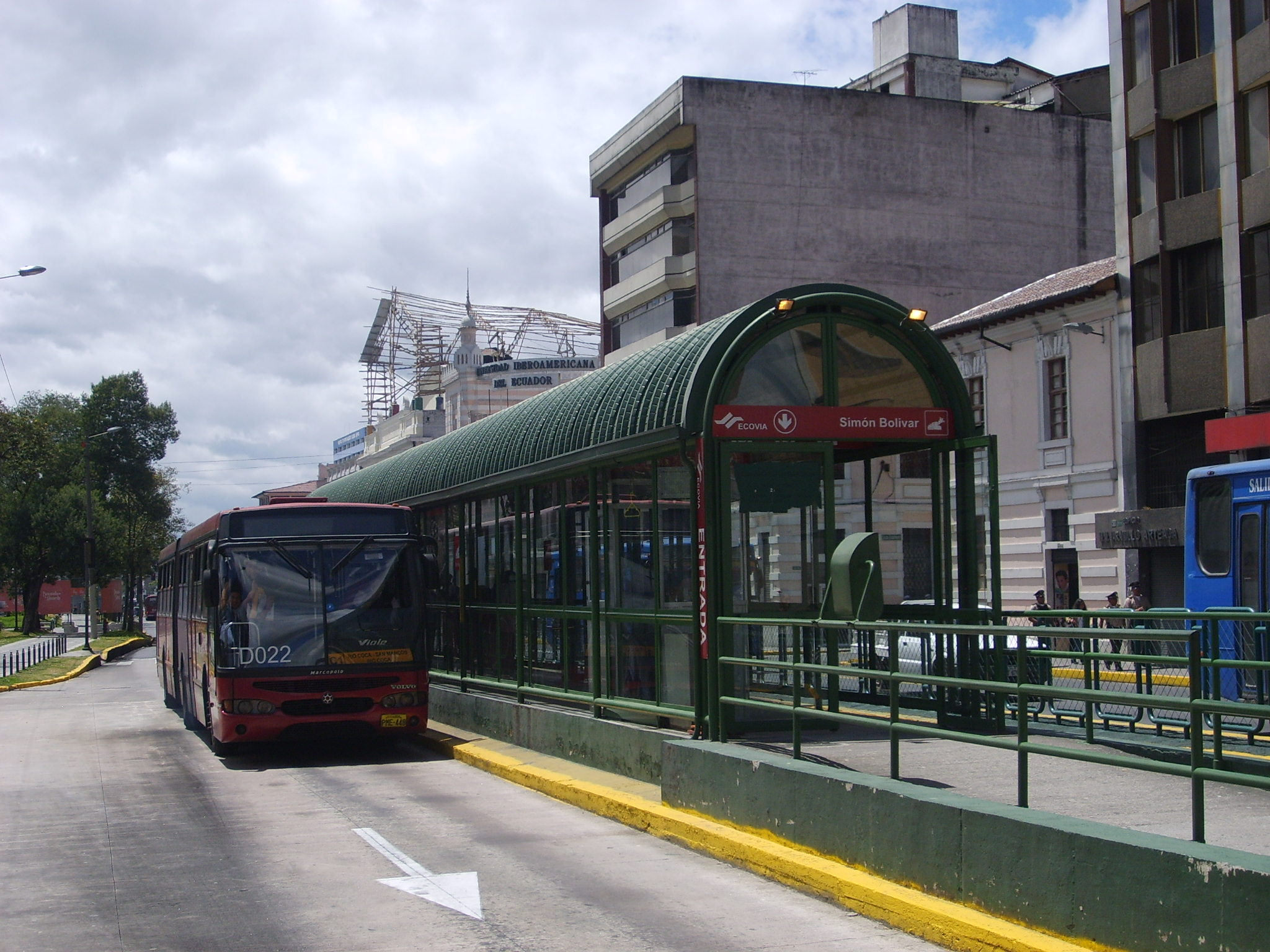 Bus stop "Simón Bolívar" of Ecovía in Quito, Ecuador